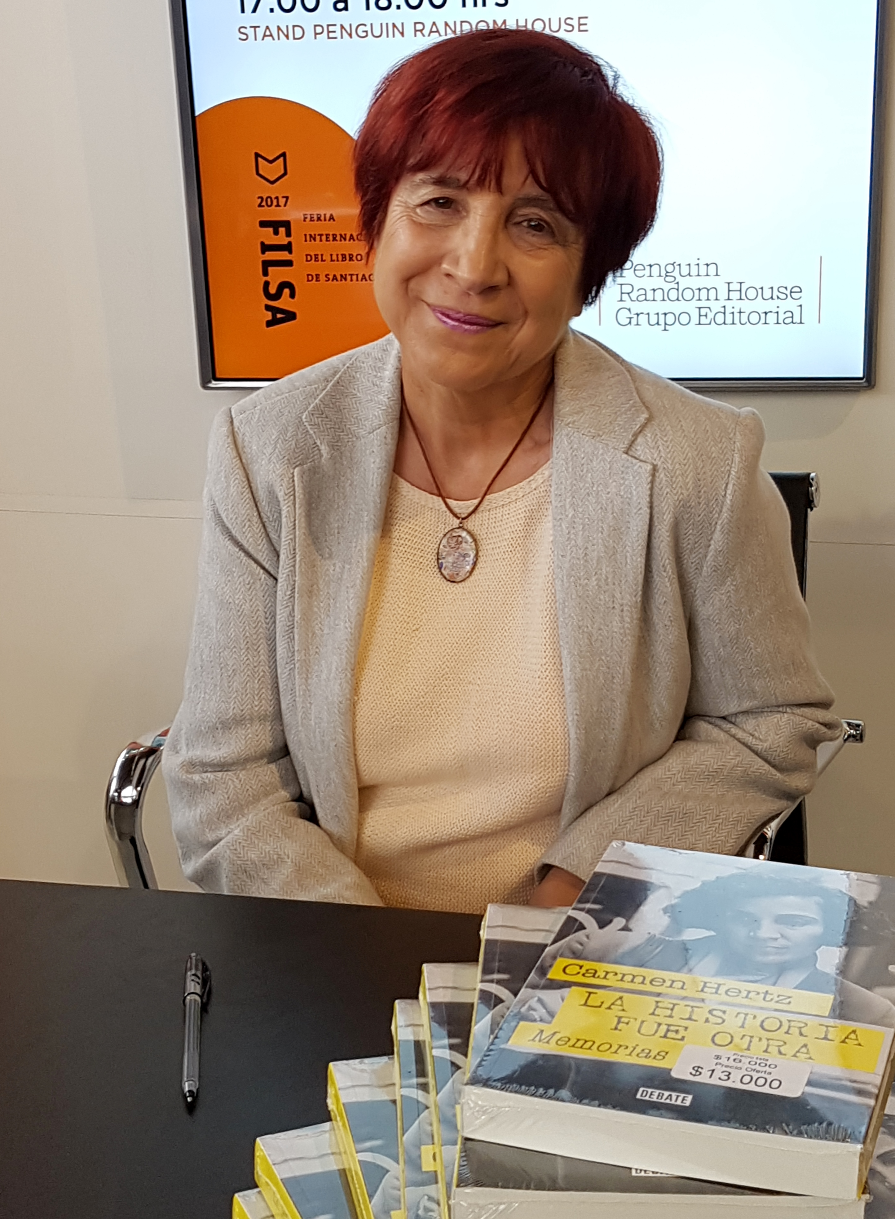 La política, abogada y defensora de derechos humanos Carmen Hertz en la Feria Internacional del Libro de Santiago 2017.